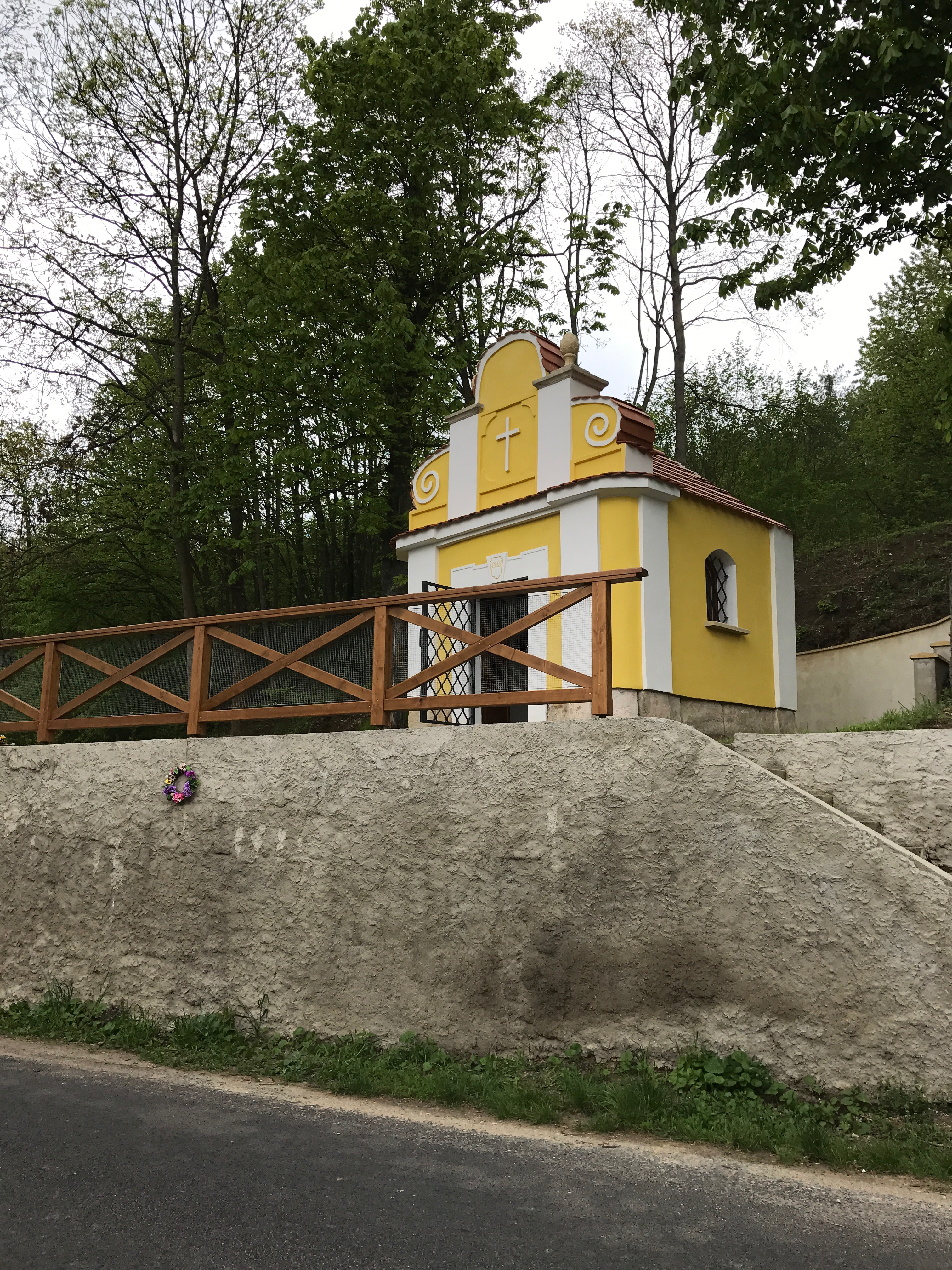 Kaple ve Vědlicích ze silnice